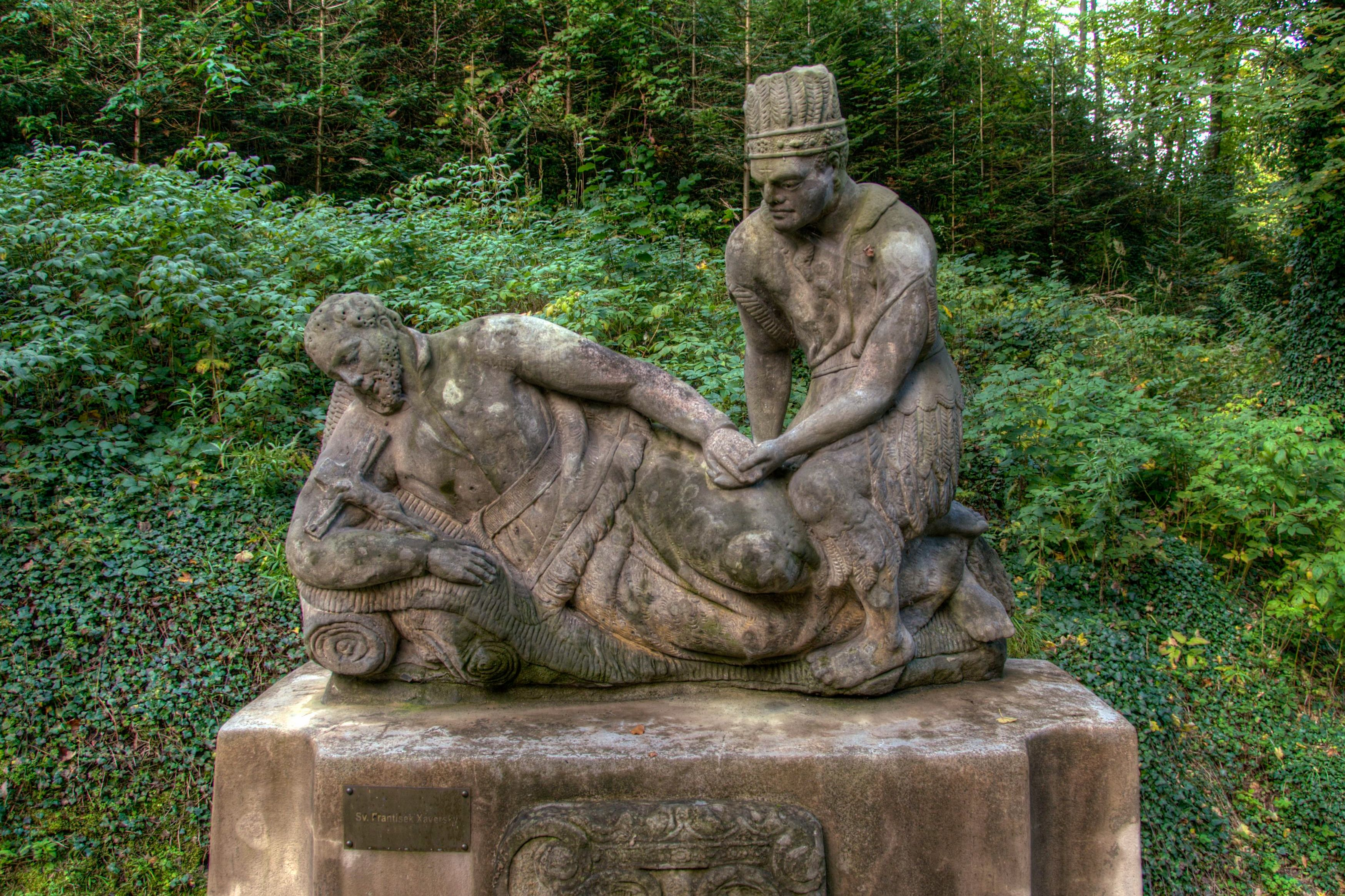 Český Šternberk, socha sv. Františka Xaverského, detail sousoší